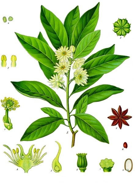 Japanischer Sternanis. A Blühender Zweig, nat. Grösse; 1 Blüthe ohne Kelch und Krone, vergrössert; 2 Blüthe im Längsschnitt, desgl.; 3 Staubgefässe von verschiedenen Seiten, desgl.; 4 Pollen, desgl.; 5 ein Carpell im Längsschnitt, desgl.; 6 Stempel, desgl.; 7 derselbe im Querschnitt, desgl.; 8 junge Frucht, nat. Grösse; 9 reife Frucht, aufgesprungen, desgl.; 10 Same, desgl.; 11 derselbe im Längsschnitt, vergrössert.